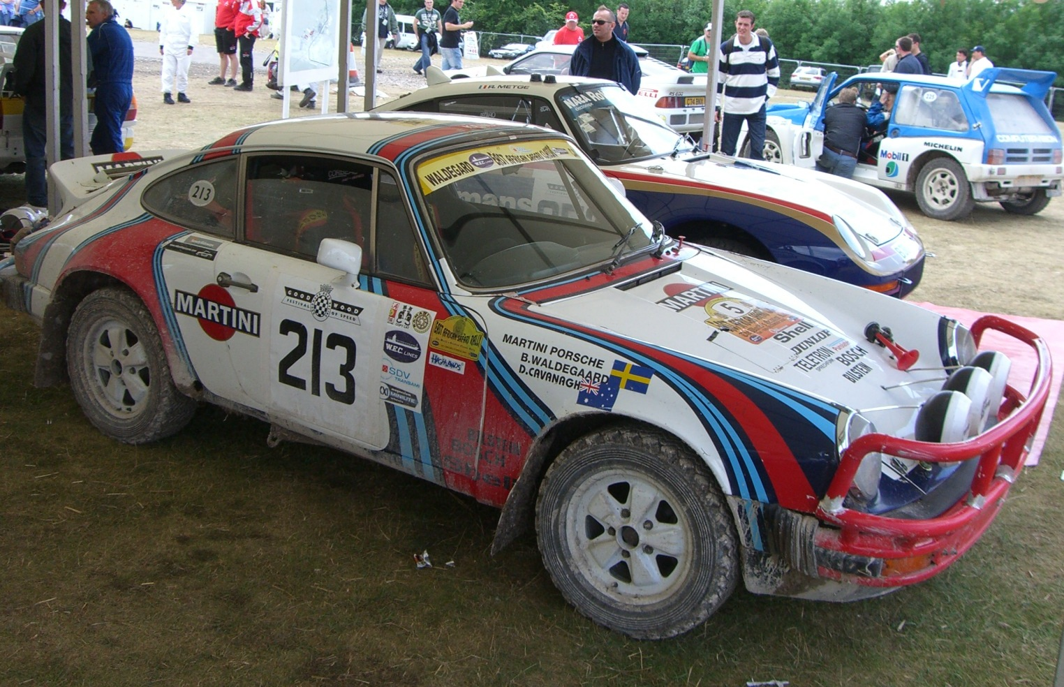 Porsche 911 SC 3.0 Martini driven by Björn Waldegård in 1977